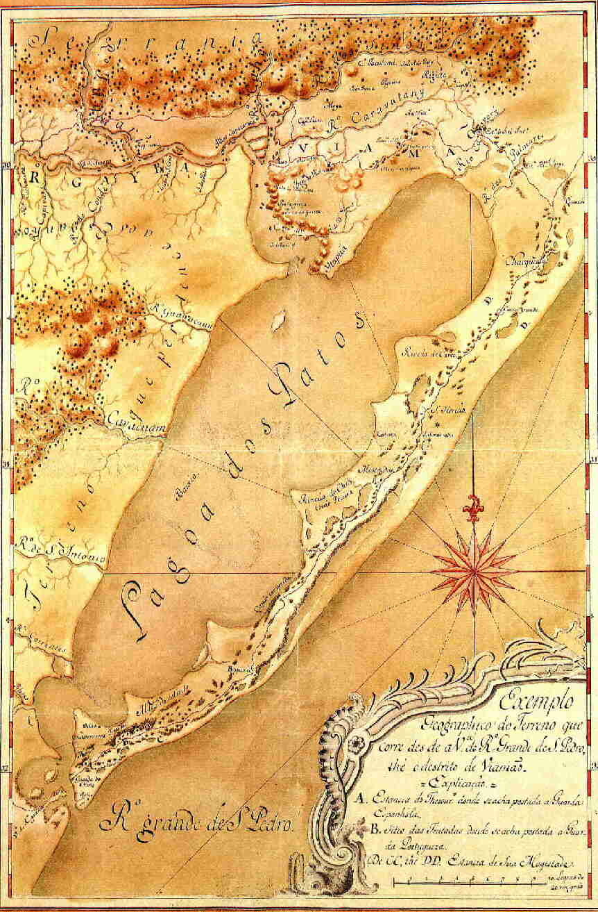 Representação do Rio Grande de São Pedro em 1763. Museu de Topografia da UFRGS.